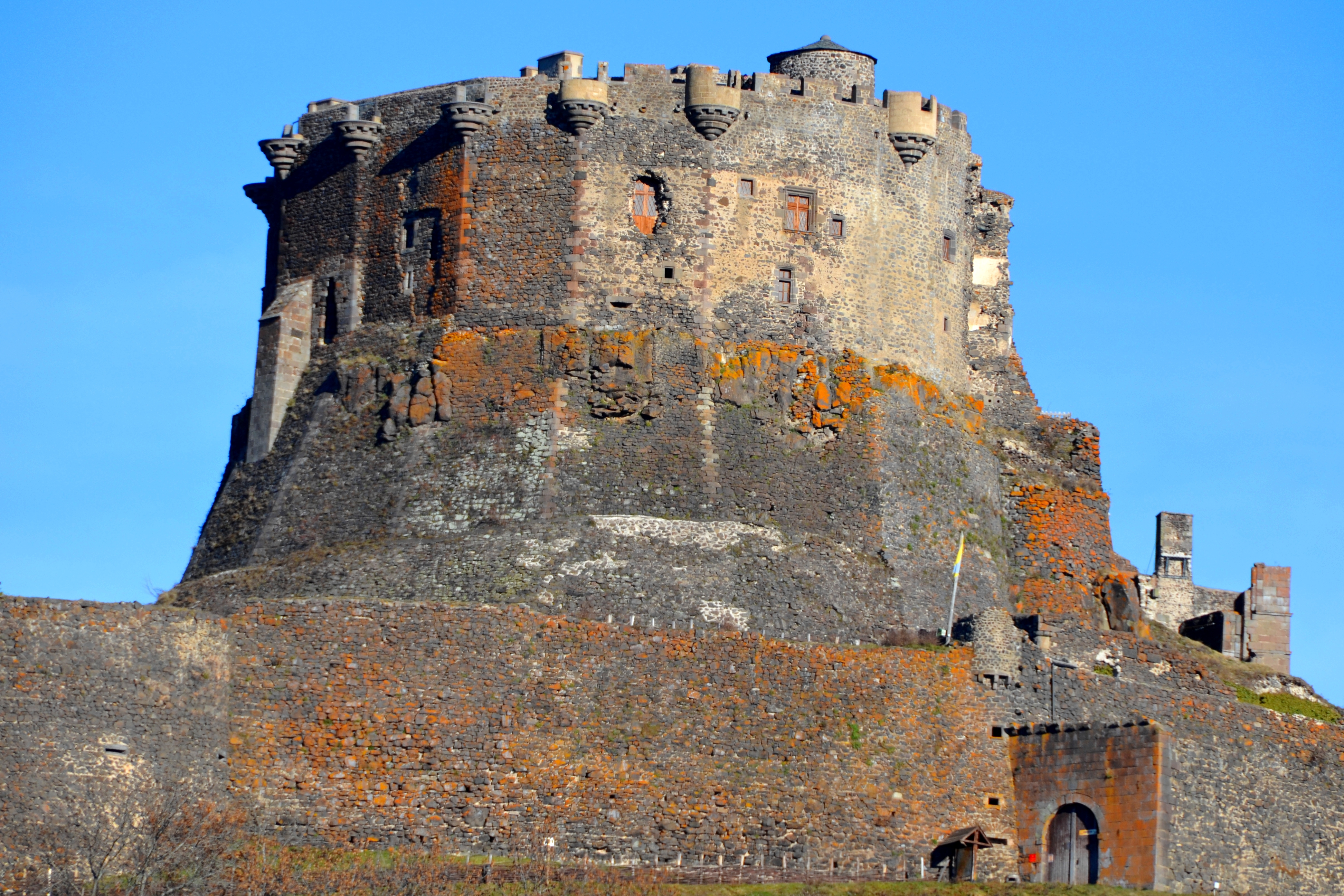 Castell de Murol